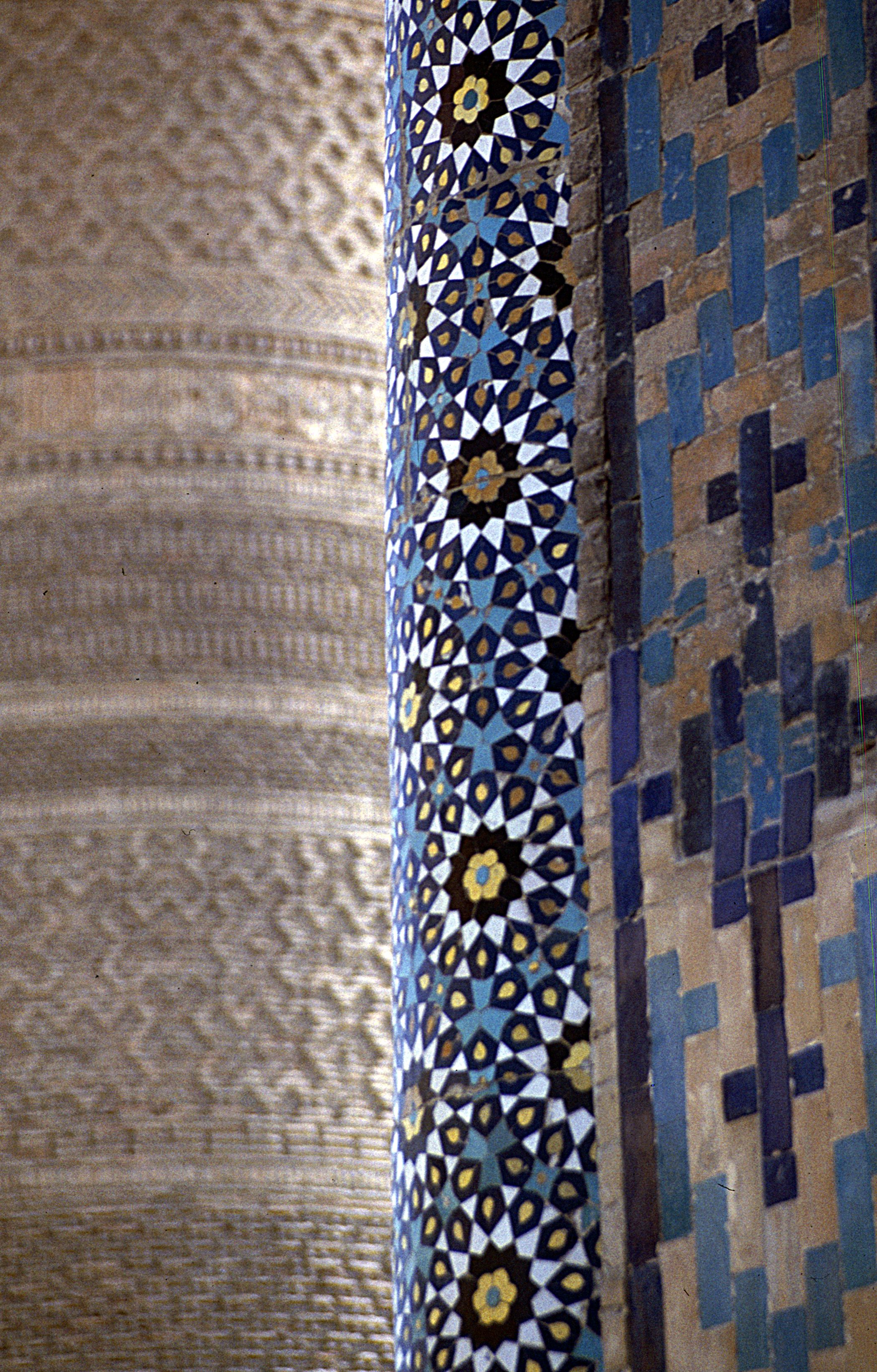 Kaljan-Komplex: Kaljan-Minarett